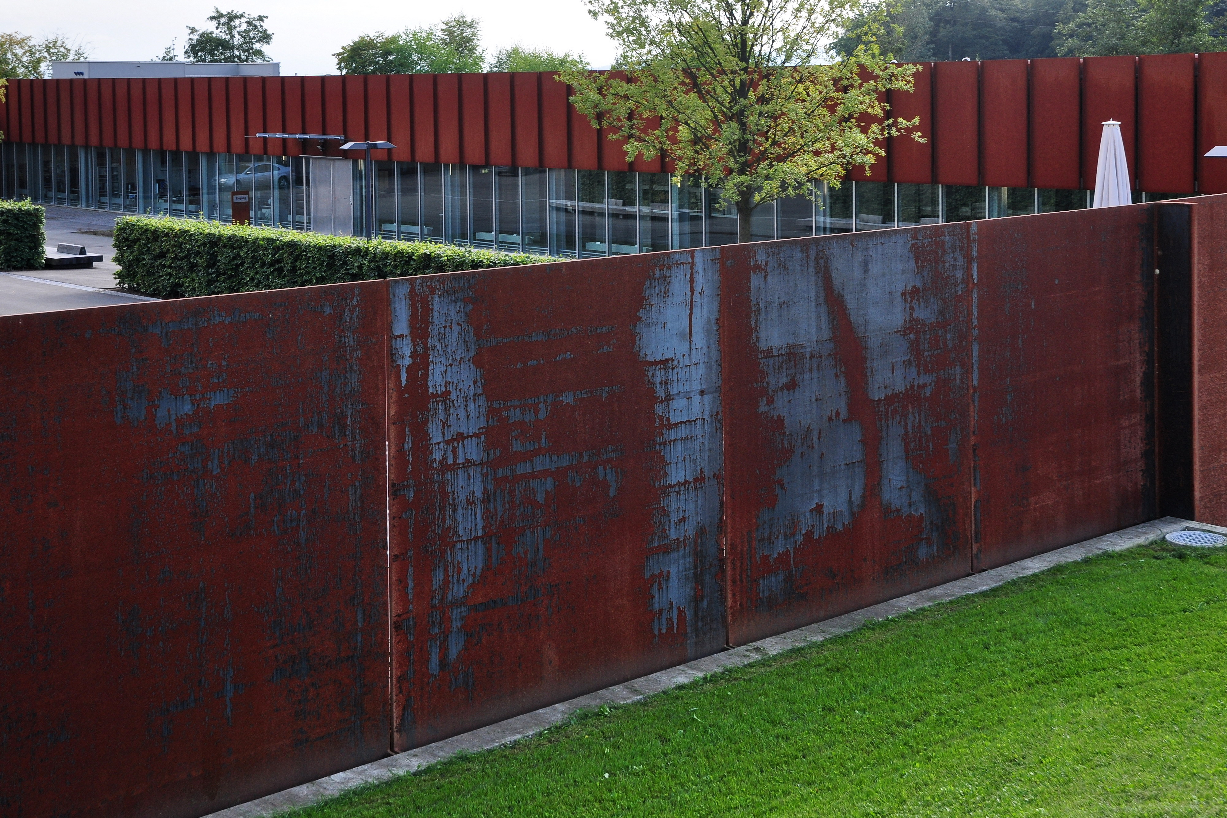 Sammlungszentrum des Schweizerischen Nationalmuseums, Lindenmoosstrasse 3 in Affoltern am Albis (Switzerland)